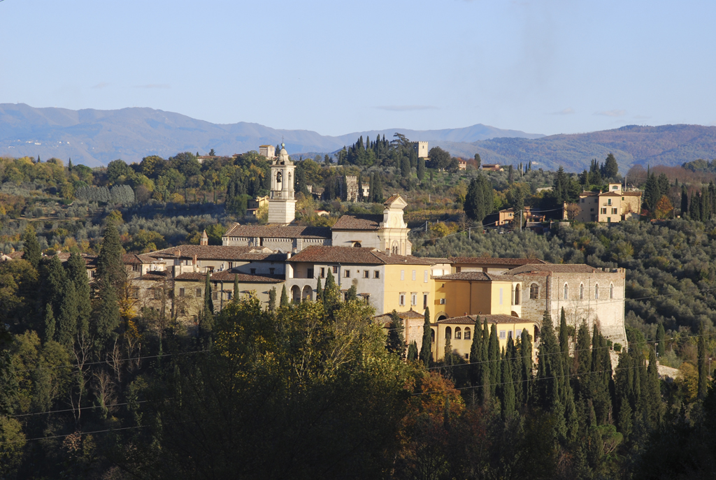 Certosa del Galluzzo, Florence, Italy. Monastery: overview from Le Gore (Via Volterrana).